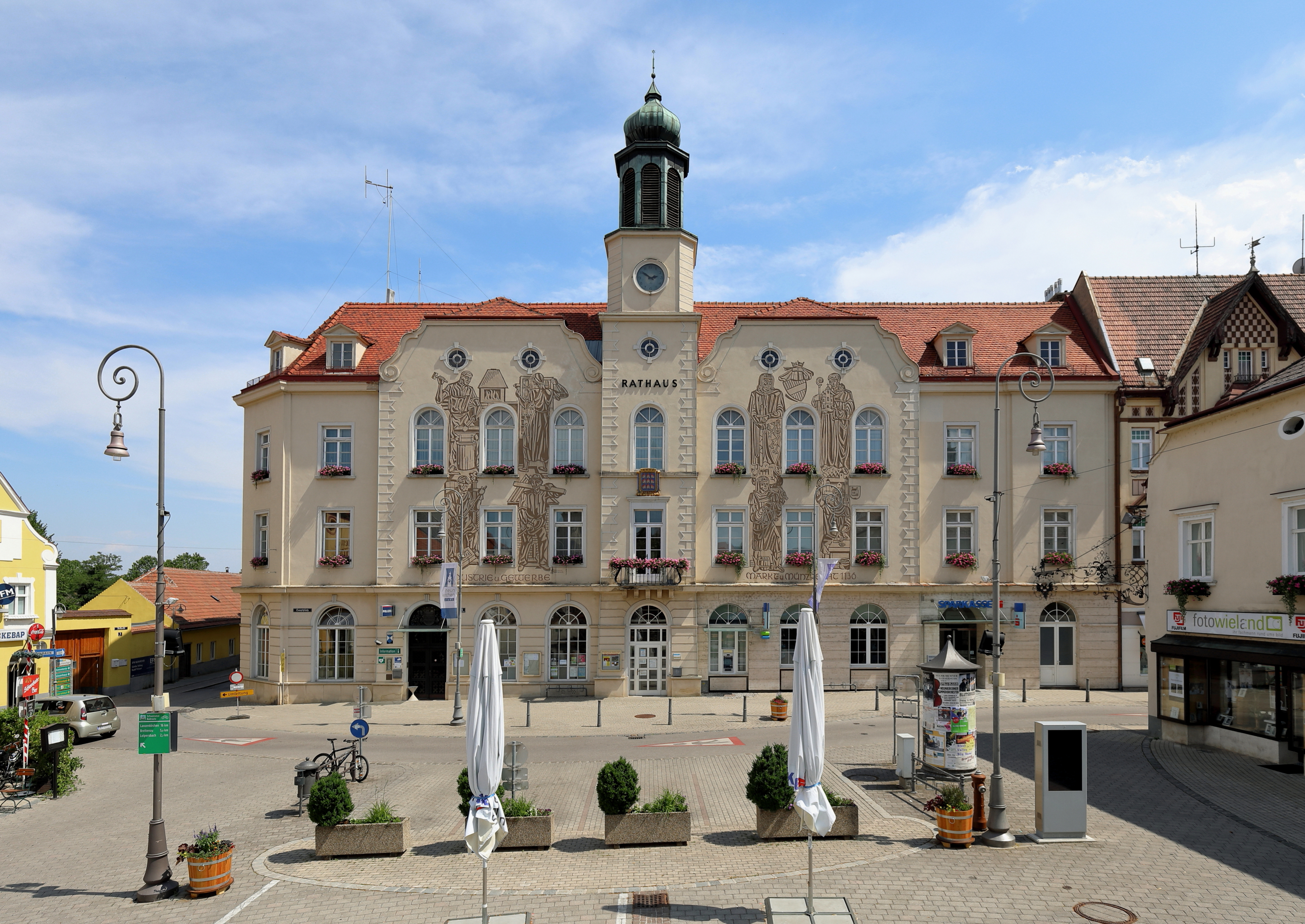 Nordwestansicht des Rathauses in der niederösterreichischen Stadtgemeinde Neunkirchen.Das Rathaus wurde von 1948 bis 1950 nach Plänen des Architekten Leo Kammel erbaut, nachdem kurz vor Ende des zweiten Weltkrieges das ursprüngliche Rathaus durch einen Großbrand zerstört wurde. Die Sgraffiti an der Rathausfassade sind ein Gemeinschaftswerk der Neunkirchner Künstler Karl Steiner und Fritz Weninger.